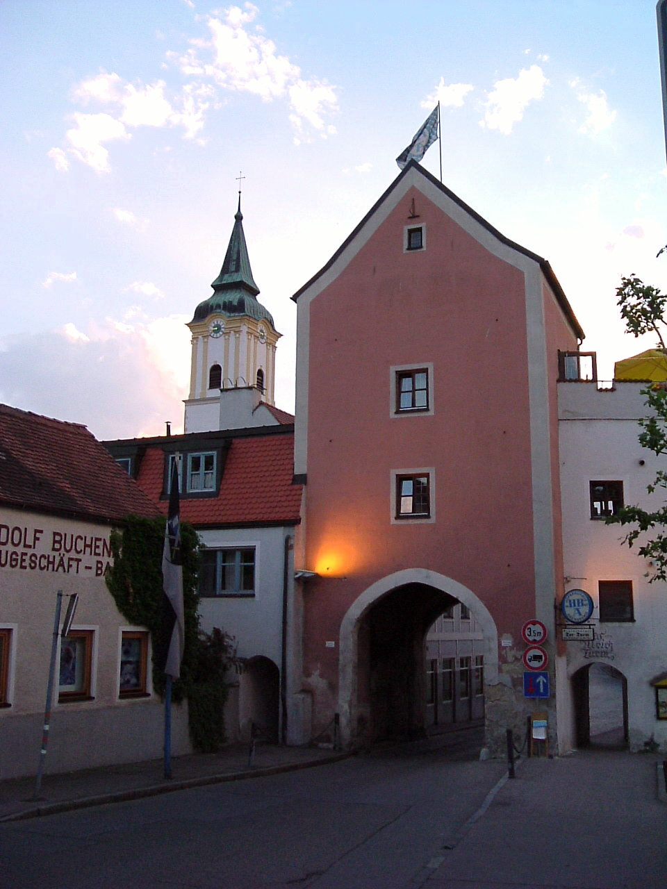 Abensberg - Regensburger Tor, Juni 2004 Public Domain, eigene Aufnahme Möglichkeiten zur Lizenzierung, bitte die nicht-benötigte Variante aus dem Code löschen